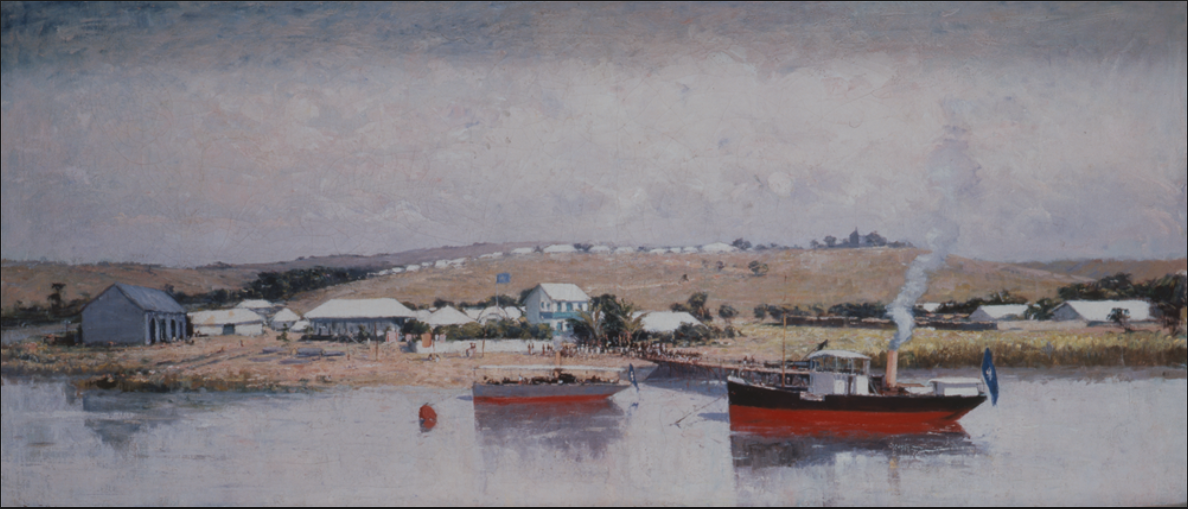 Boma, par Frans Hens, 1888, huile sur toile, 60 x 136 cm. Tervuren, musée royal de l’Afrique centrale, inv. HO.0.1.320